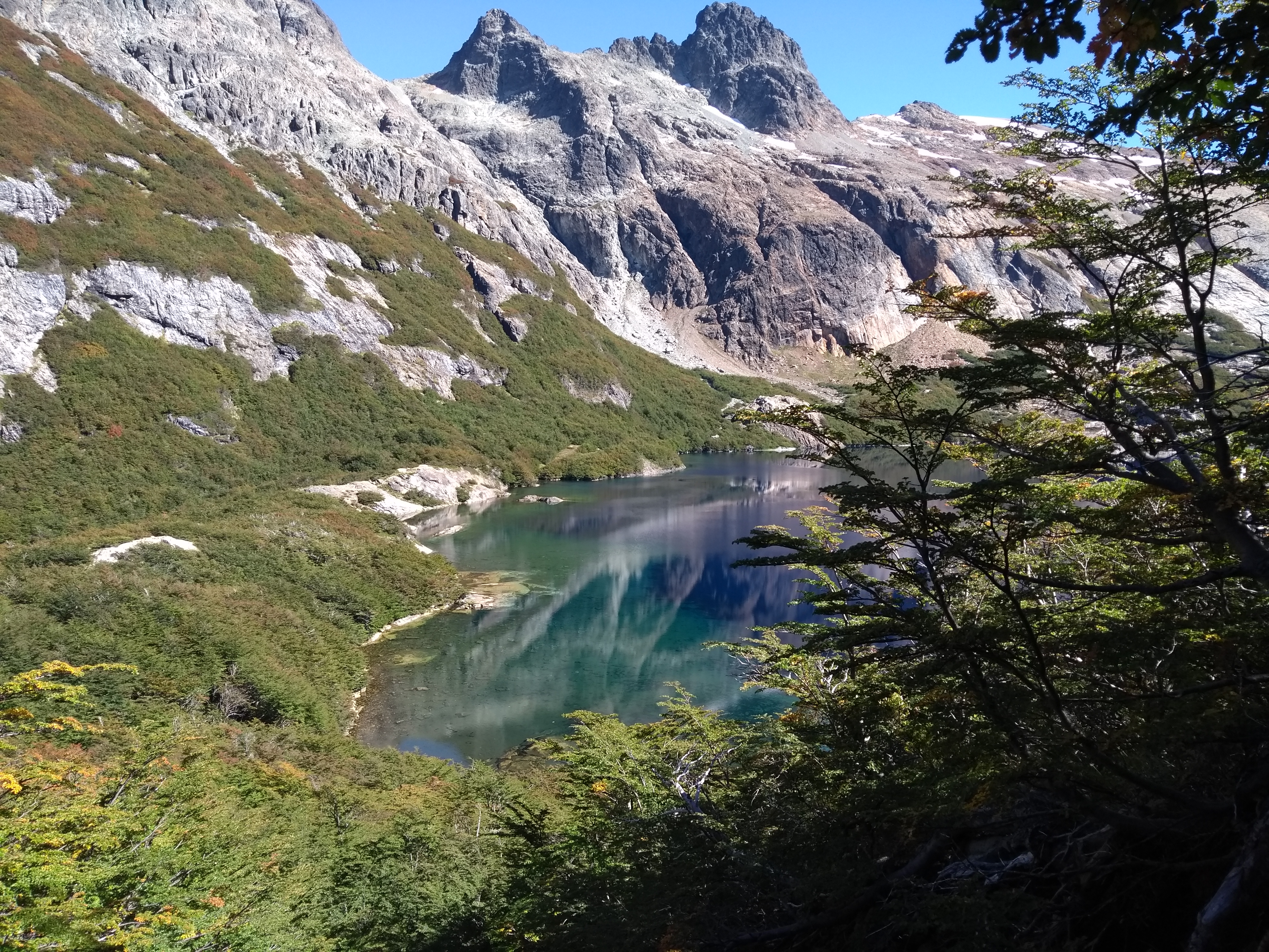 El inicio del sendero comienza en Los Césares, ubicado a orillas del Lago Mascardi, sobre la ruta de acceso a Pampa Linda. El camino bordea el Río Manso hasta llegar al puente colgante. De allí se continúa a orillas del Arroyo Claro hasta su encuentro con el Arroyo Callvuco. Por este último se continúa hasta su naciente en la Laguna Azúl (Calvú).